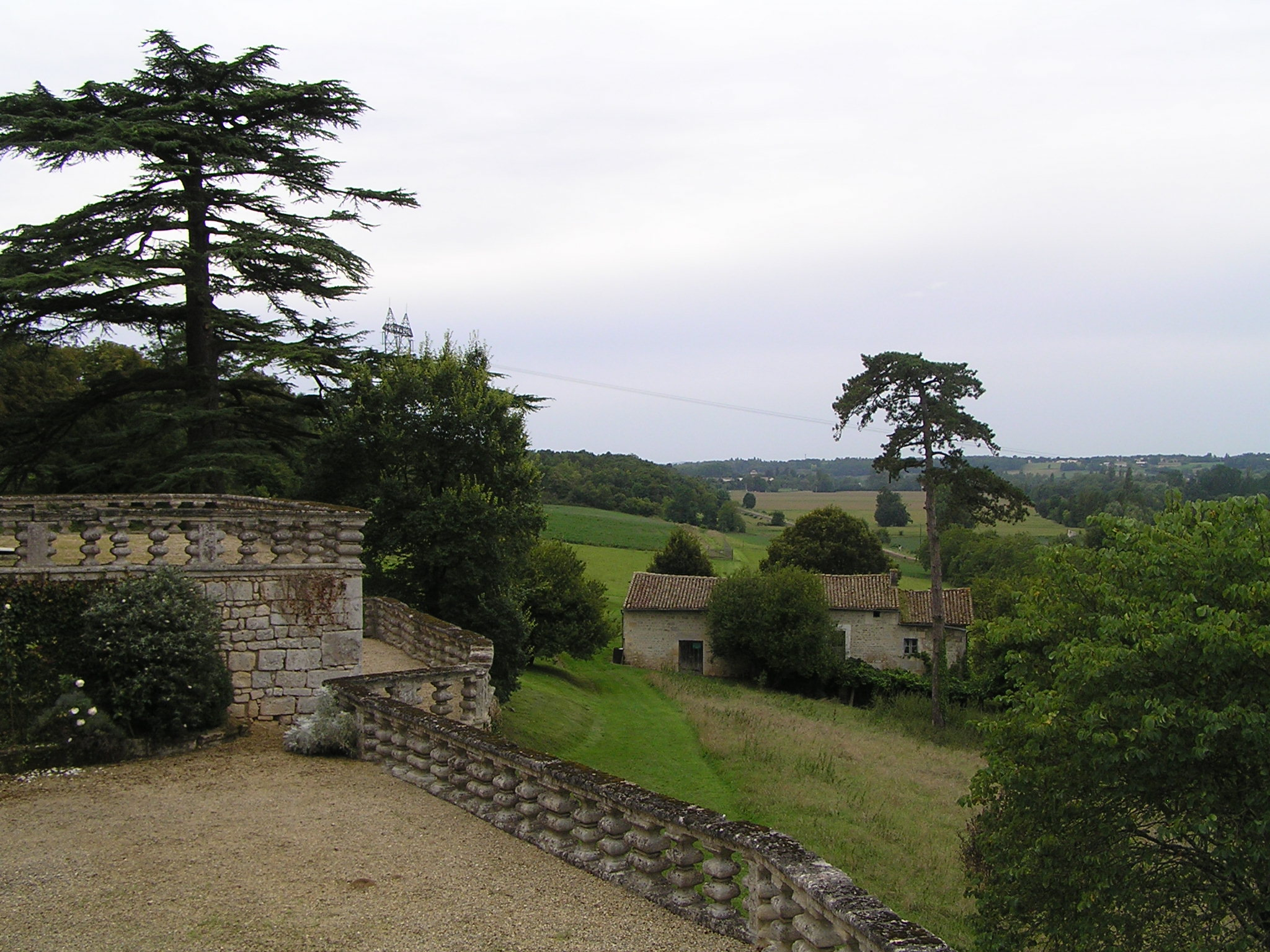 vue depuis la terrasse du château de Fleurac à Nersac